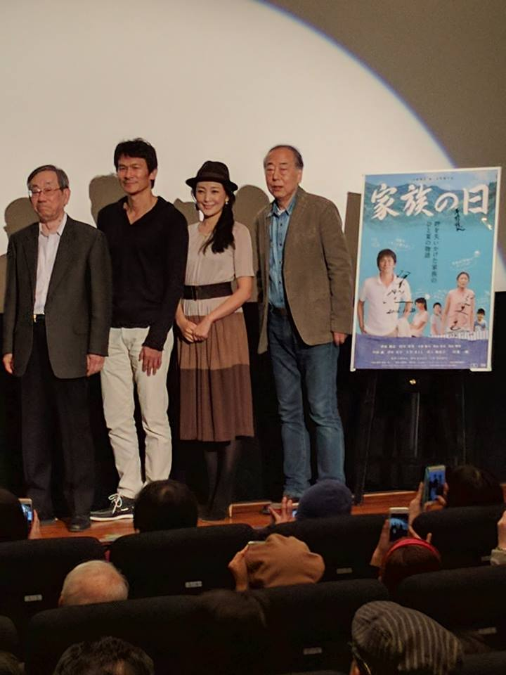 新宿 K's cinemaにて舞台挨拶